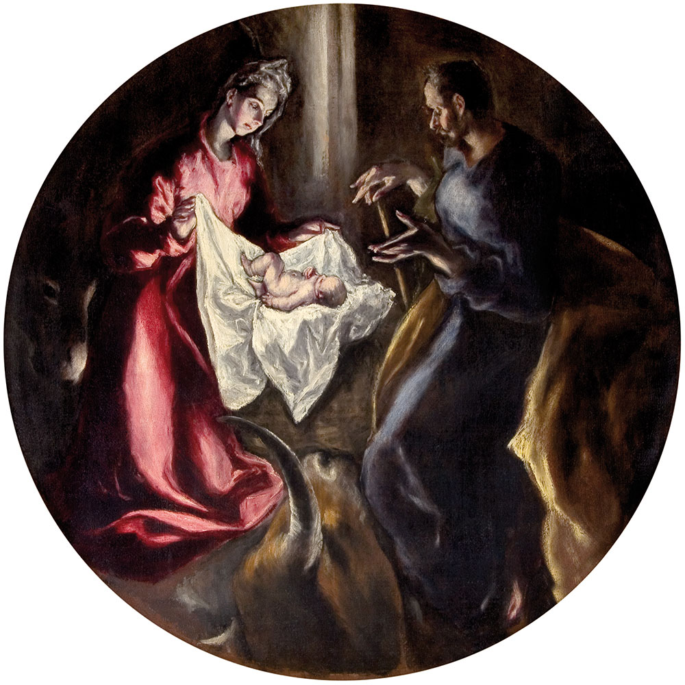 La obra representa el nacimiento del Niño Jesús, que se halla junto a sus padres, la Virgen María, y San José. Procede de una Adoración de Pastores que El Greco había realizado para el Colegio de Doña María de Aragón, en este caso la escena se simplifica a un Nacimiento sin la presencia de los pastores. El Greco pinta una escena tenebrosa sólo interrumpida por la luz que emana de la figura del Niño Jesús. De esta manera, el pintor intenta representar que en el momento de la alumbramiento de Jesucristo es cuando el Mundo conoce la Luz Divina, y presenta al Niño como foco de luz que guía a la humanidad en su camino hacia la Verdad. En este lienzo también se aprecian escorzos típicos del pintor, como la original intrusión de la cabeza retorcida del buey en primer plano bajo los pies de María, que enfatiza aún más la idea de que estos cuadros fueron realizados para ser visto desde abajo.